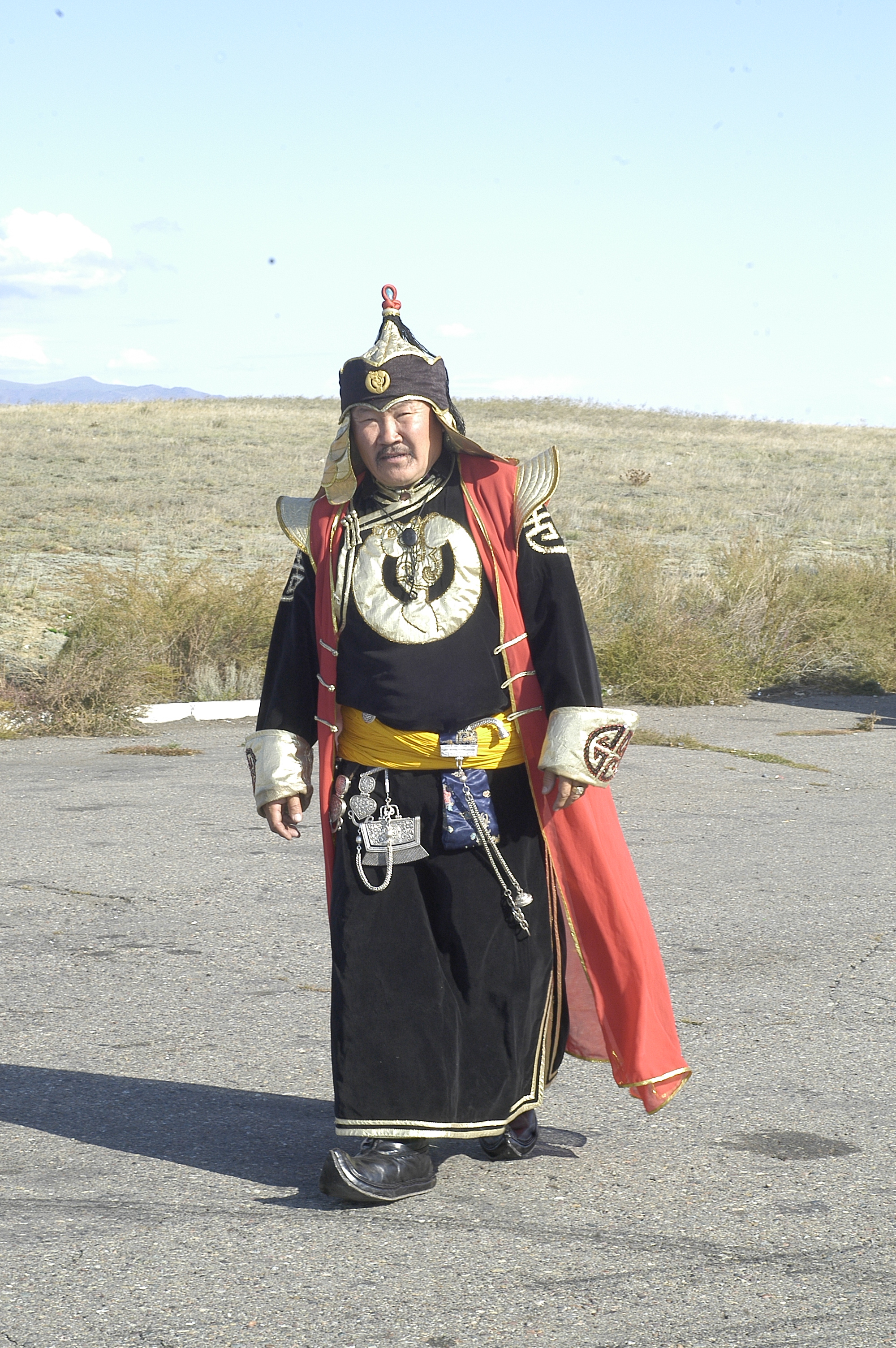 Ондар Конгар-оол Борисович - Народный Хоомейжи, местечко "Тос-Булак", в 9 километрах от г. Кызыла, Республики Тыва